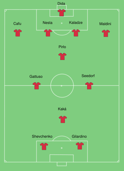 Formazione Tipo Milan 05-06